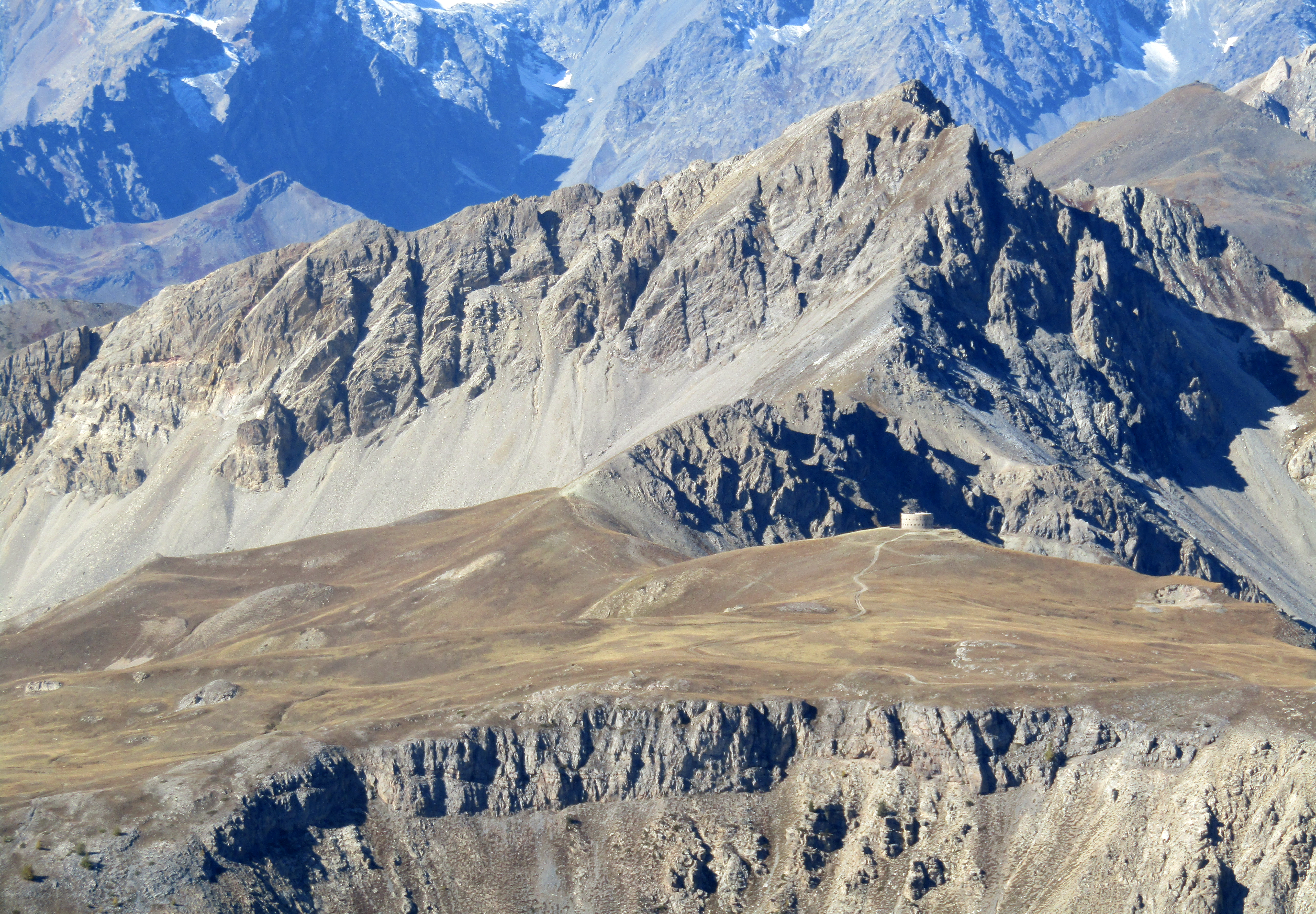 La Grand Aréa depuis la Pointe de Pécé - Massif des Cerces